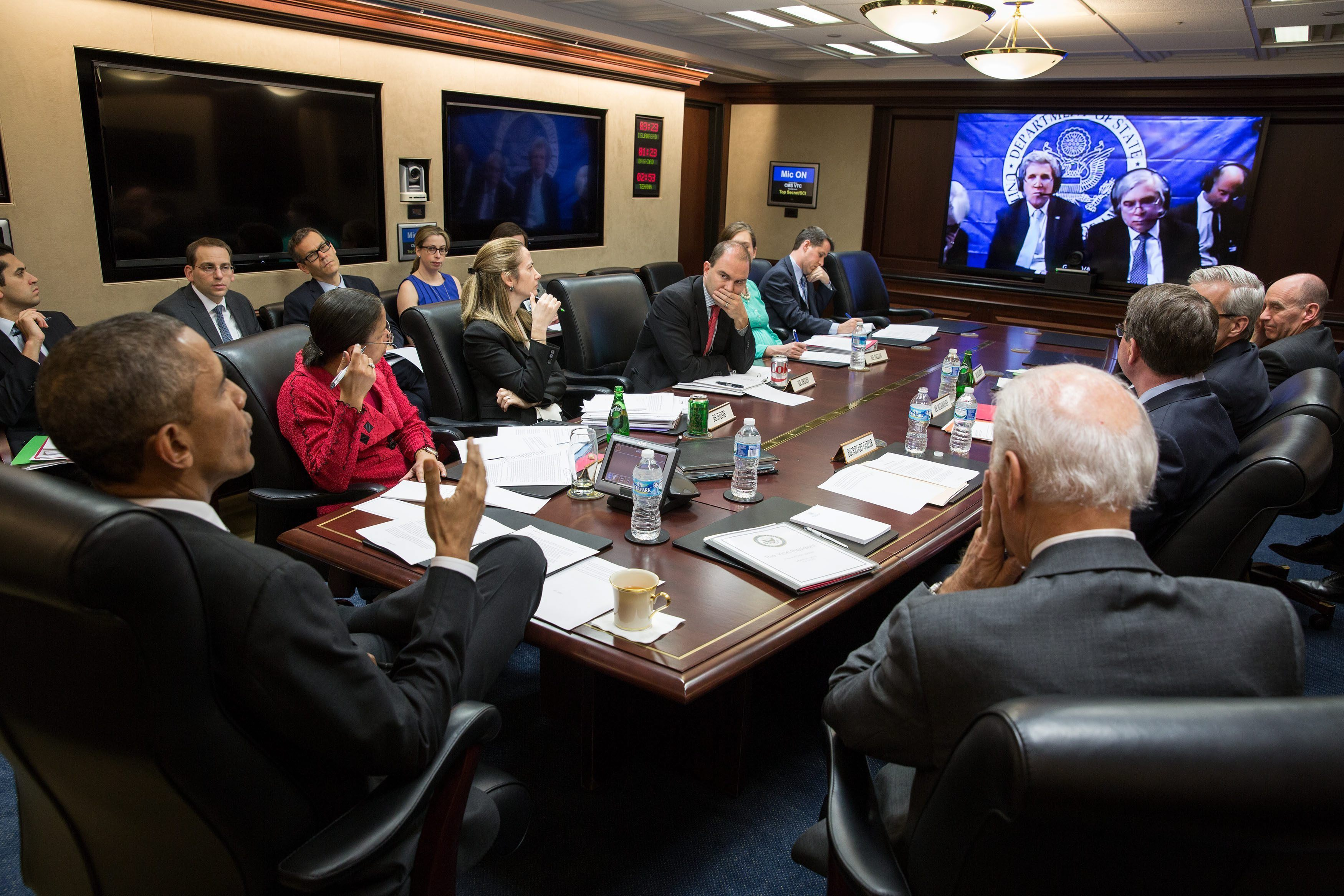 تماس تصویری کاخ سفید